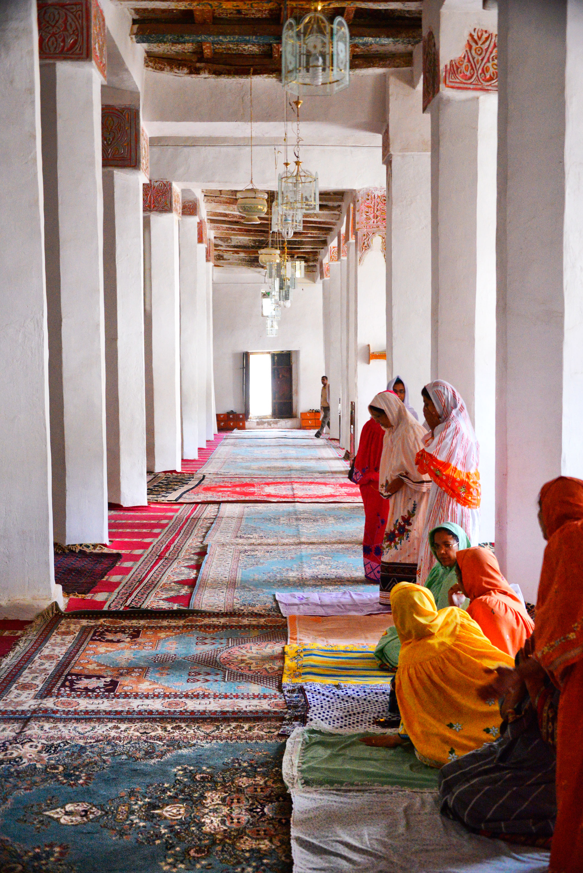 Yemen